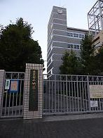 都立竹早高校の正門